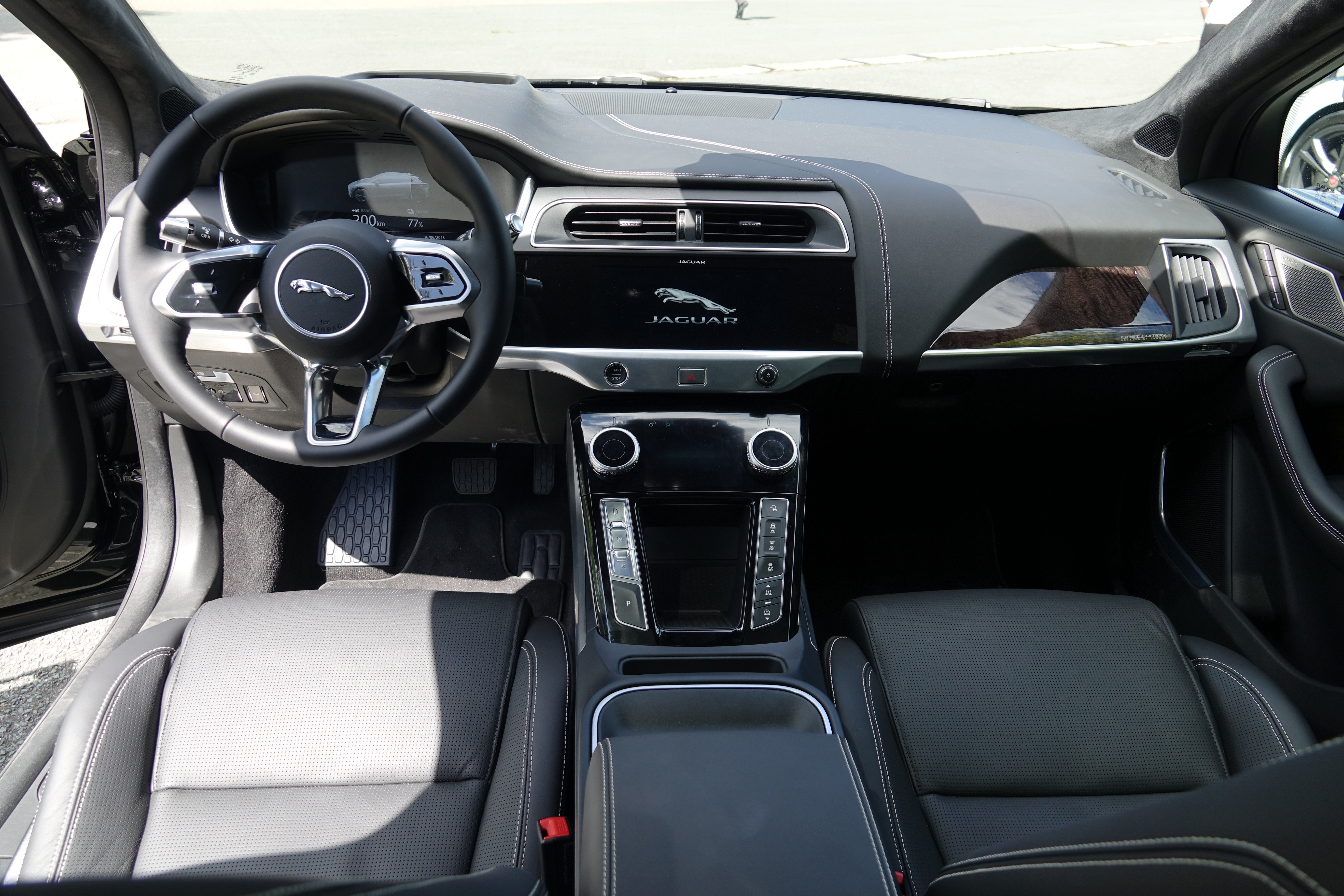 Jaguar I-Pace à Mortefontaine